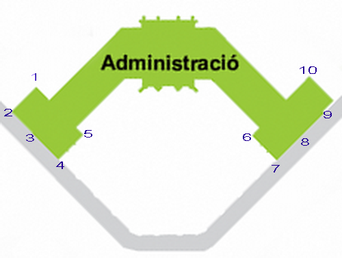 Plano d'ubicació de les escultures històriques a l'exterior de l'Hospital de Sant Pau, obres d'Eusebi Arnau